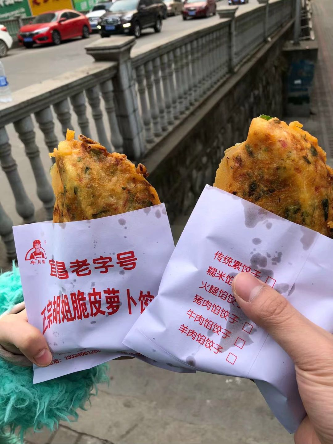 中文（中国大陆）: 宜昌小吃：萝卜饺子